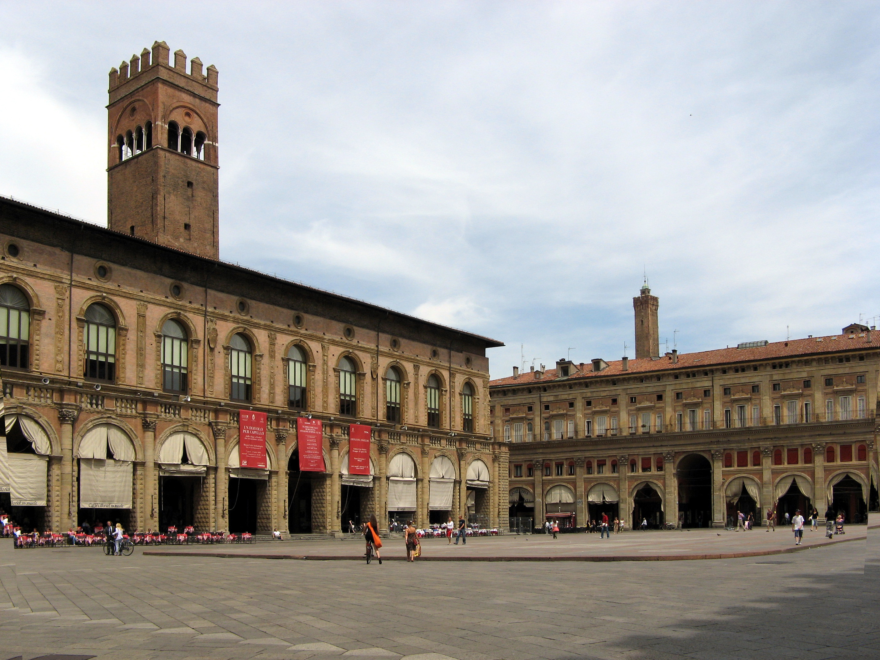 Il Palazzo del Podestà e il Palazzo dei Banchi in Piazza Maggiore a Bologna.